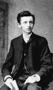 filozof Oskar Kraus